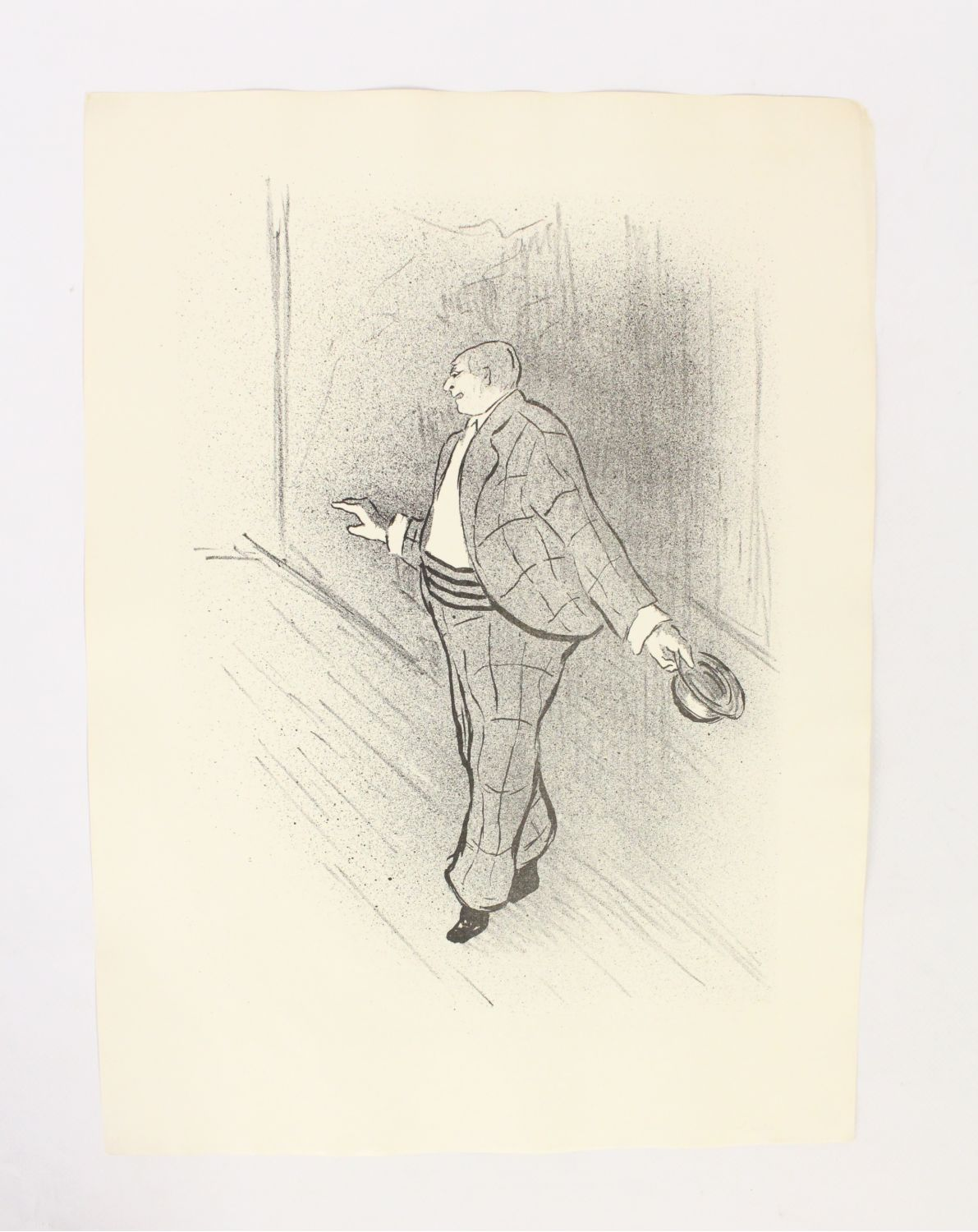 Portrait de Xavier Marie Alphonse Libermann, dit Libert (1840-1896)